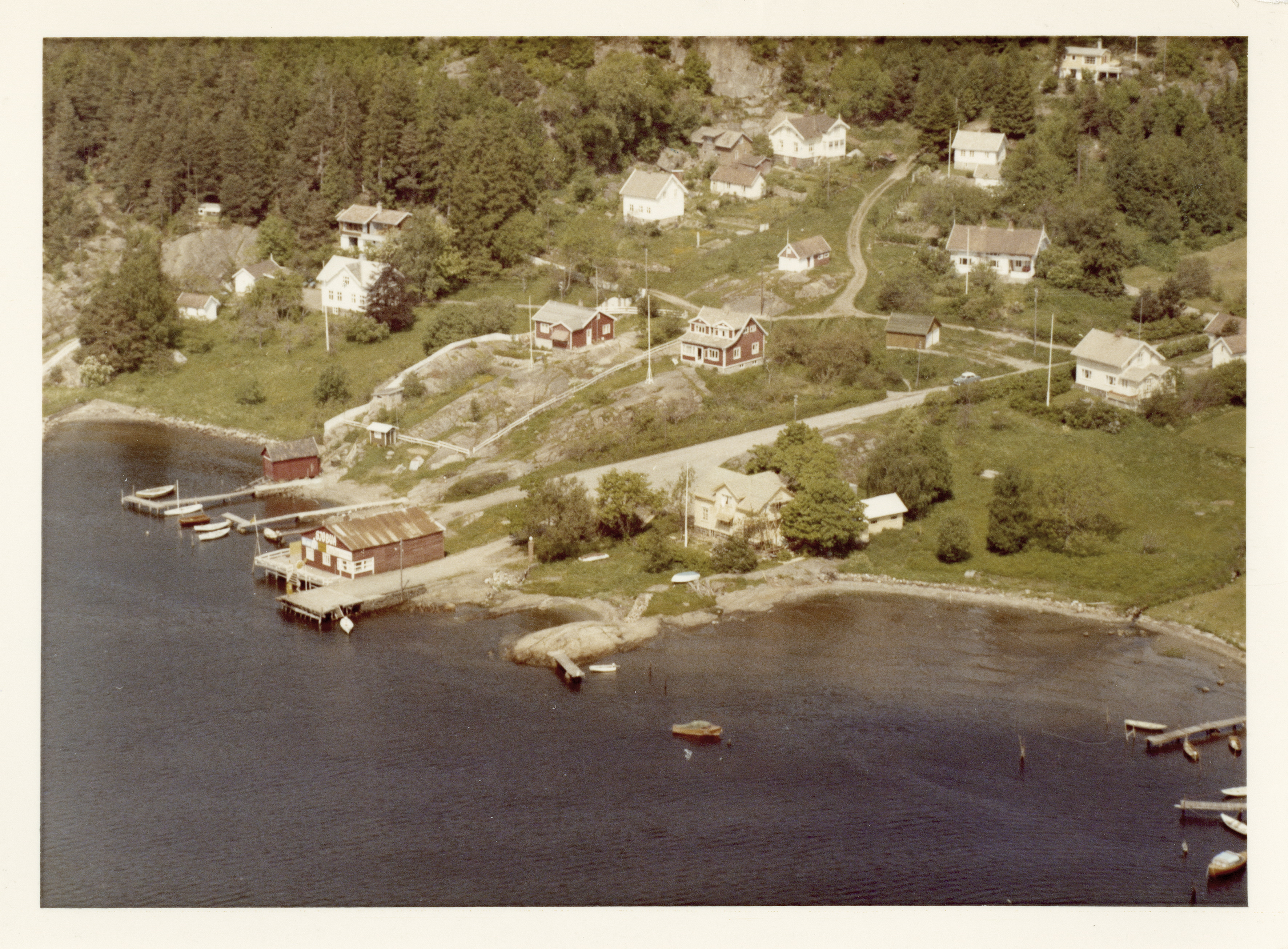 WF.S.164465